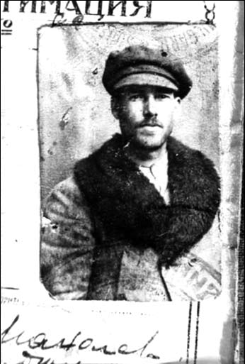 Лична карта на Илия Дилберов.